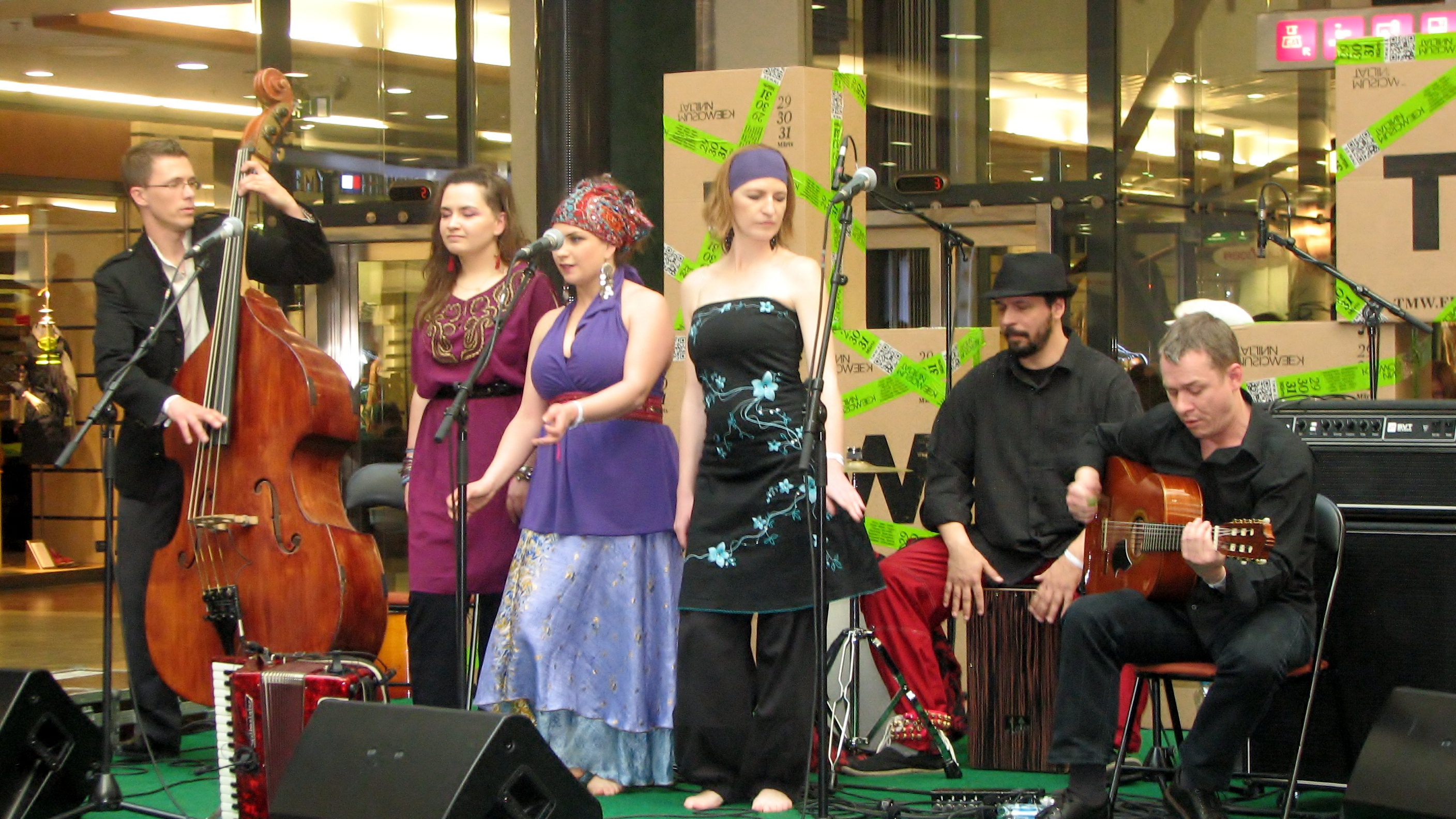 Poola ansambel Dikanda esinemas Tallinn Muzic Weekil